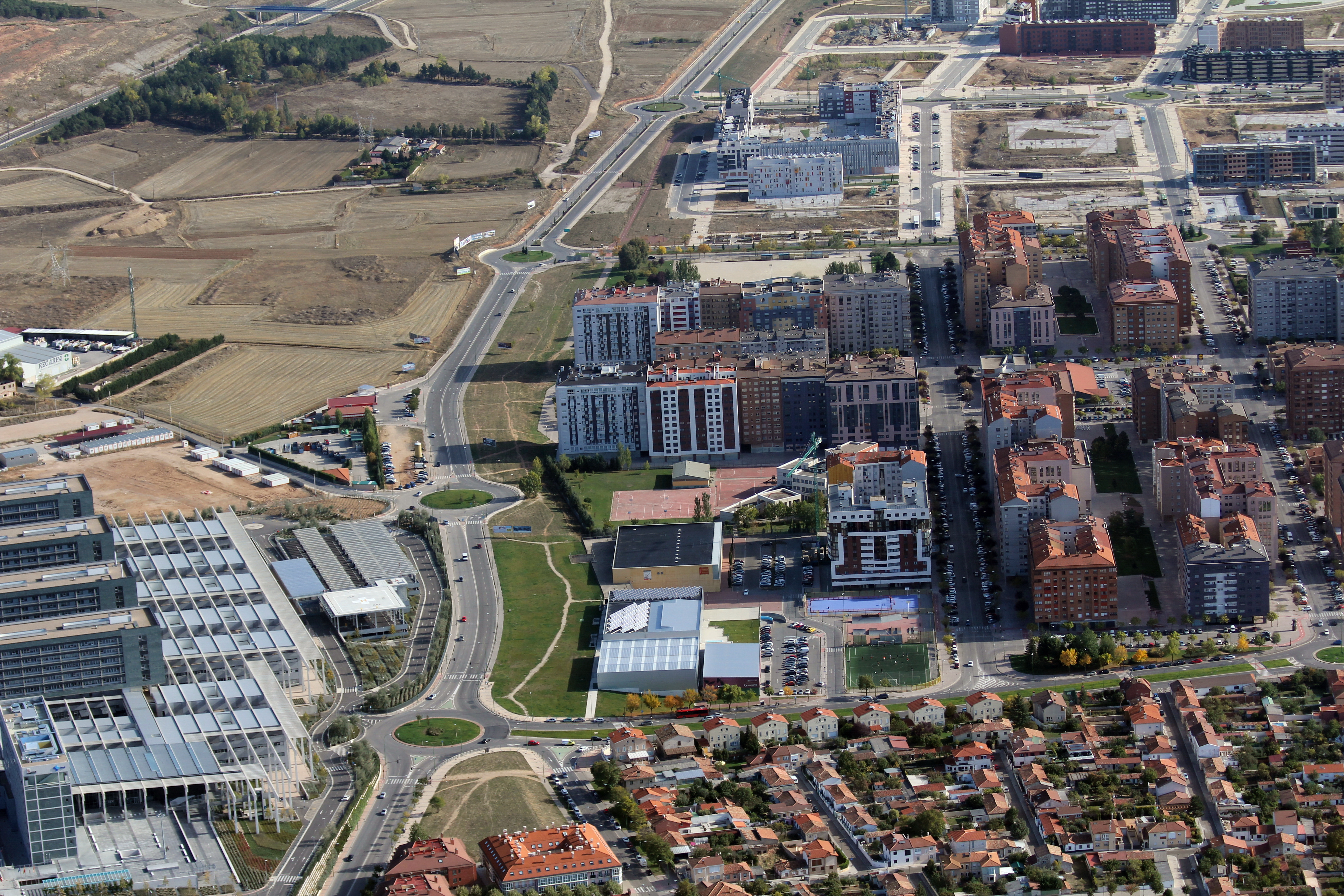 Imagen de esta arteria con vistas hacia el este de la ciudad. A la derecha (sur) podemos apreciar el barrio del G-3 o Vistalegre y a la izquierda (norte) el complejo asistencial de Burgos con el HUBU